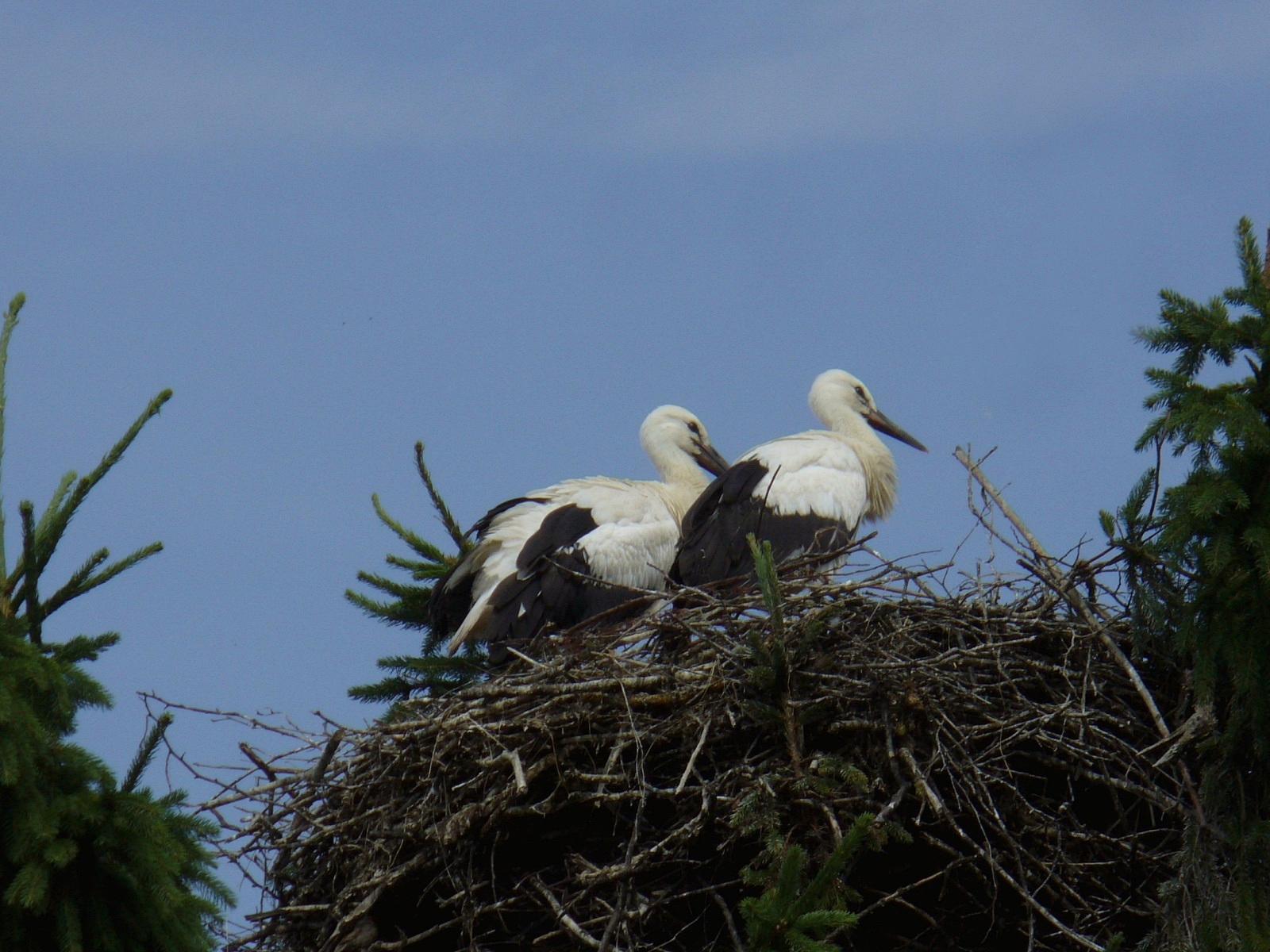 Птенцы аиста в гнезде